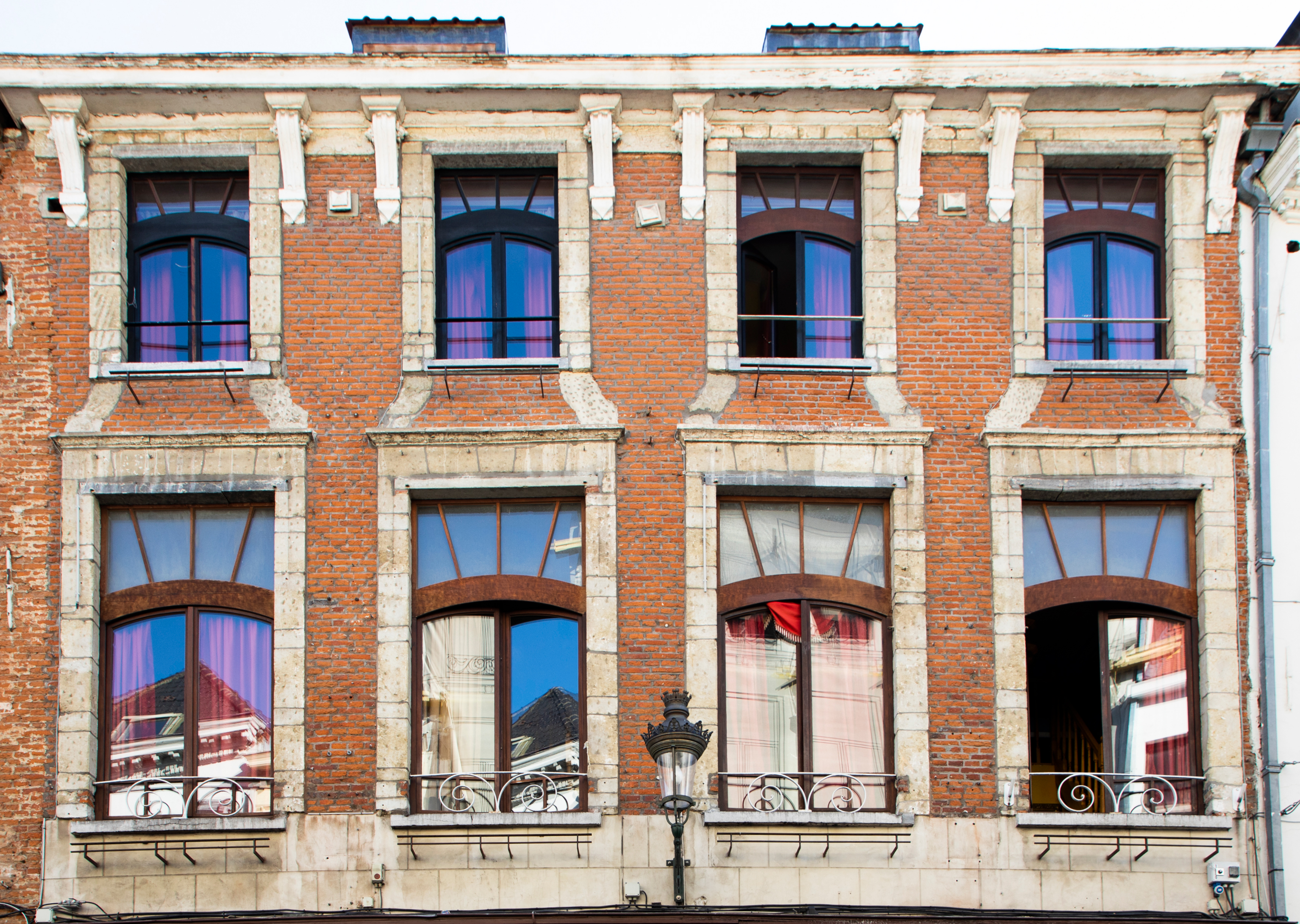 La maison du Marché au Fromage à Bruxelles, construite en 1709 et appelée "Den Eyseren Draeck", ou "au Dragon de Fer", actuel numéro 15-17.